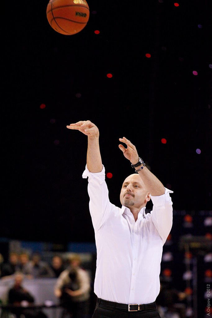 Матч всех звезд баскетбольной Суперлиги 2012. Киев. Ukrainian All-star